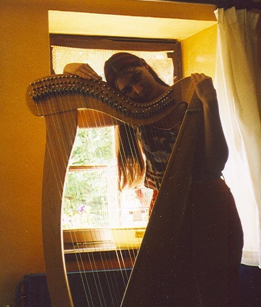 Harpe celtique de couleur claire